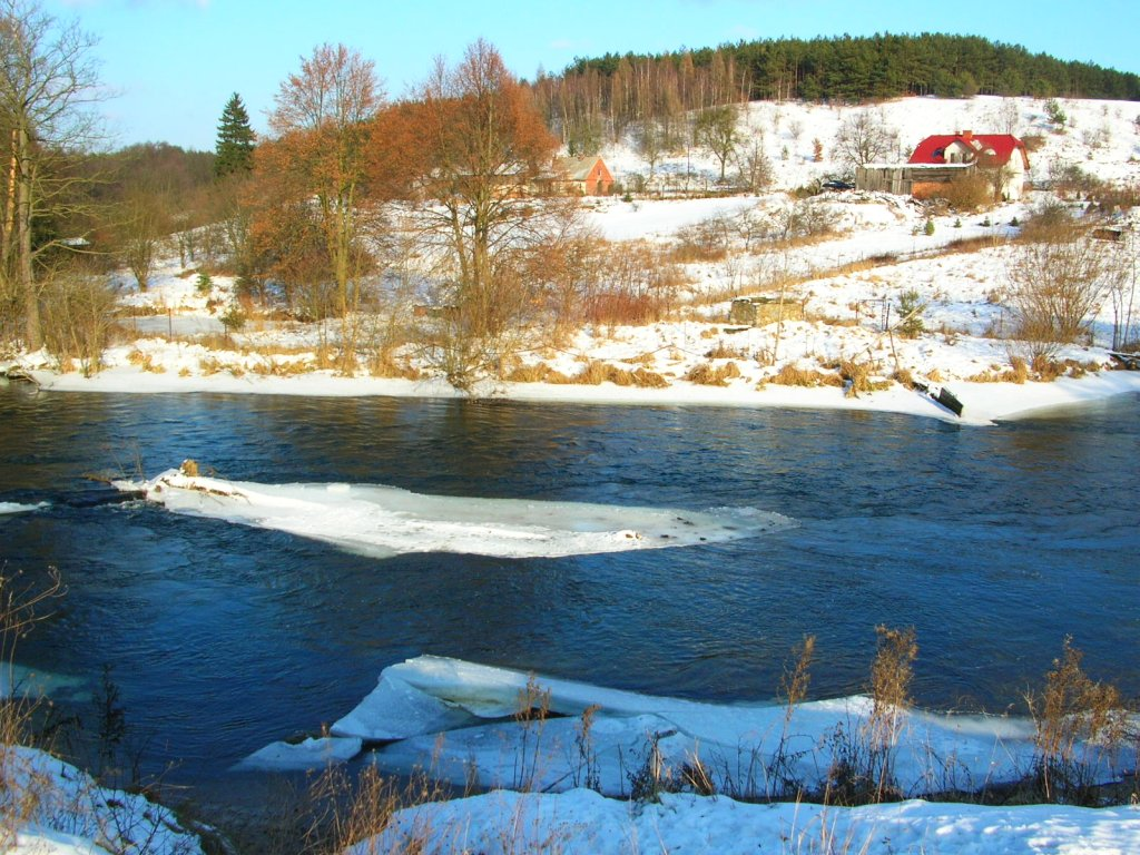 Brda w Bydgoszczy - Opławiec